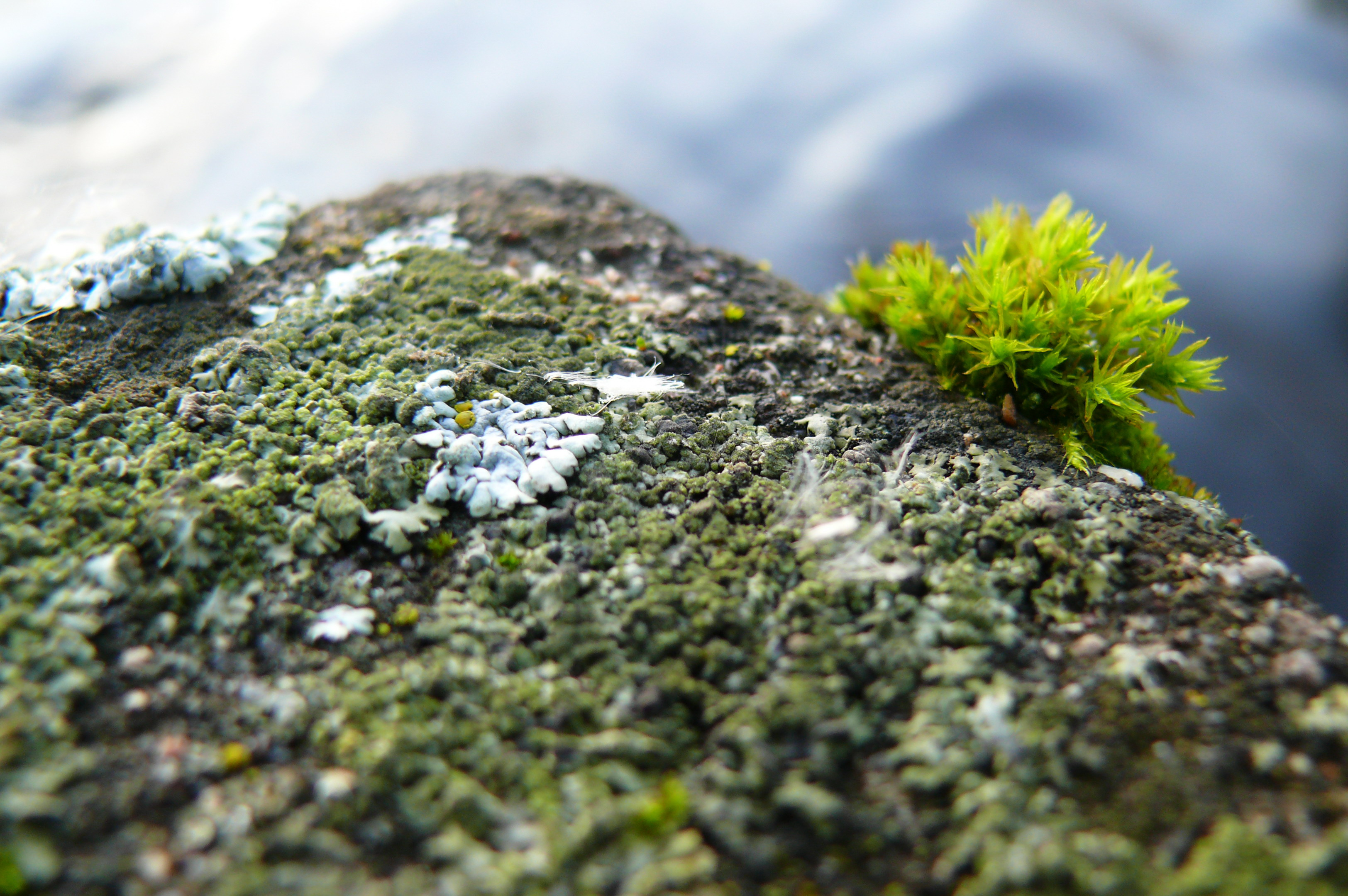 Harilik hallsamblik (Hypogymnia physodes (L.) Nyl.) ja tüvetutik (Orthotrichum speciosum Nees) Pärnu jõe ääres Türi vallas.